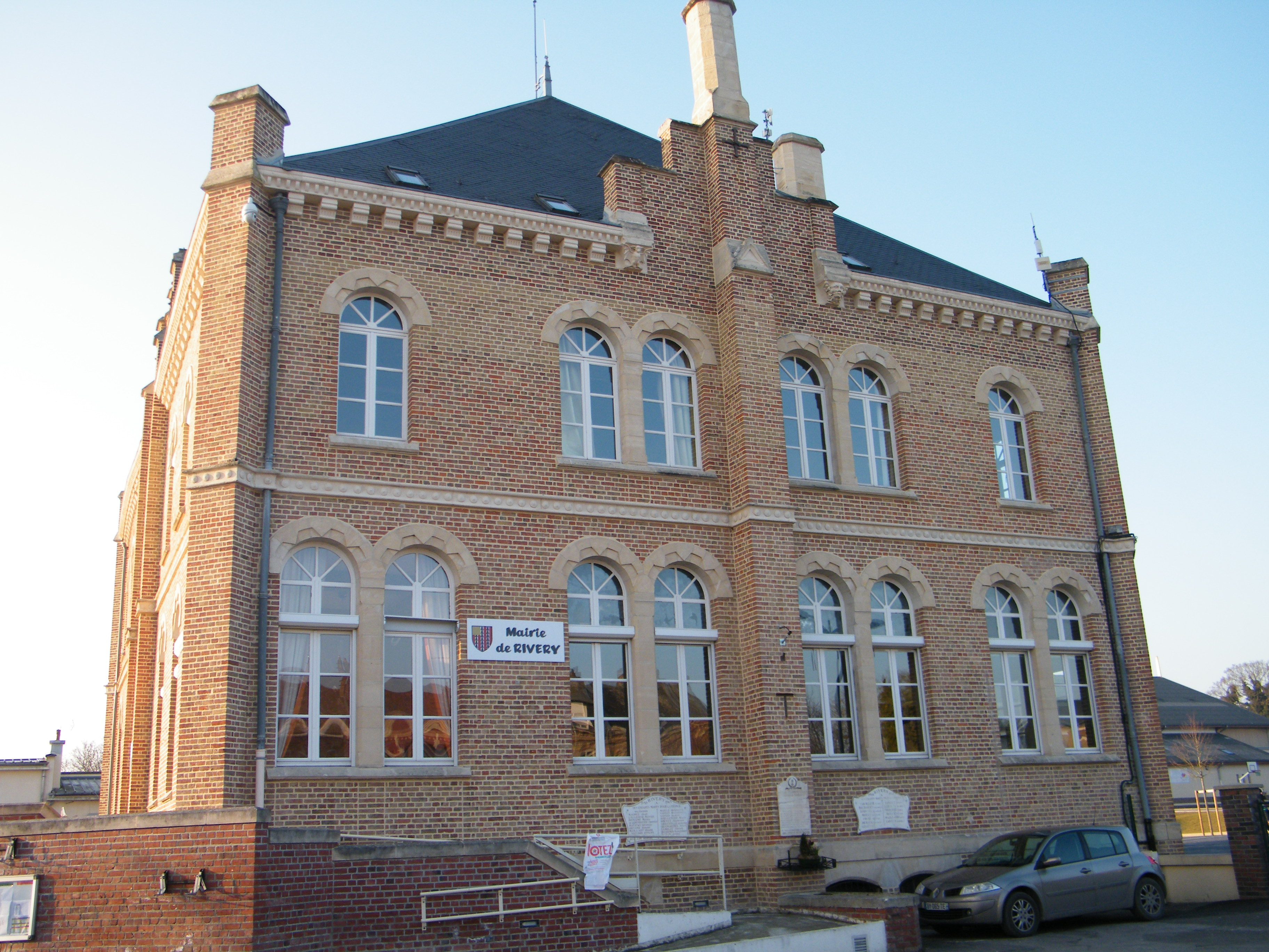 Rivery, Somme, fr, mairie.